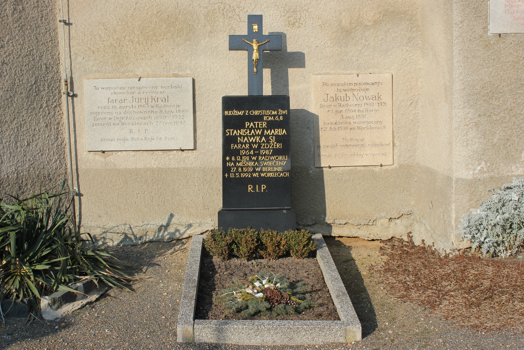 Hornjoserbsce: Radwor; rowy Jurja Krala, Stanisława Nawki a Jakuba Nowaka-Horjanskeho při Křižnej cyrkwi.